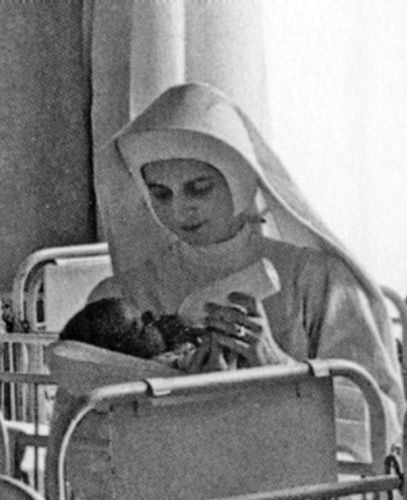 St. Elisabeth-Krankenhaus Leipzig, Graue Schwester bei Säuglingspflege (1932)